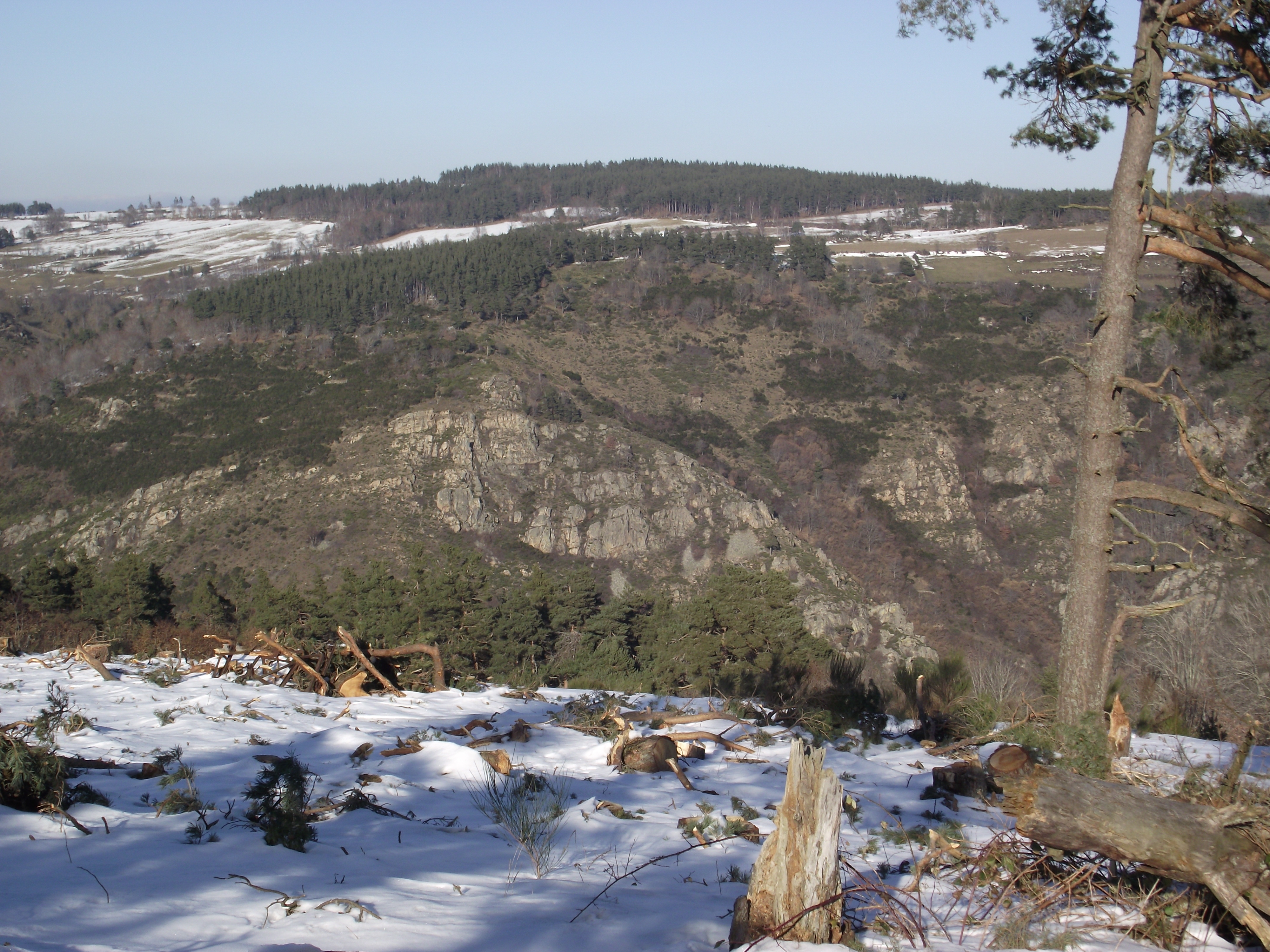 Vallée de l'Enfer en février vue de Ste Lucie (Lozère)